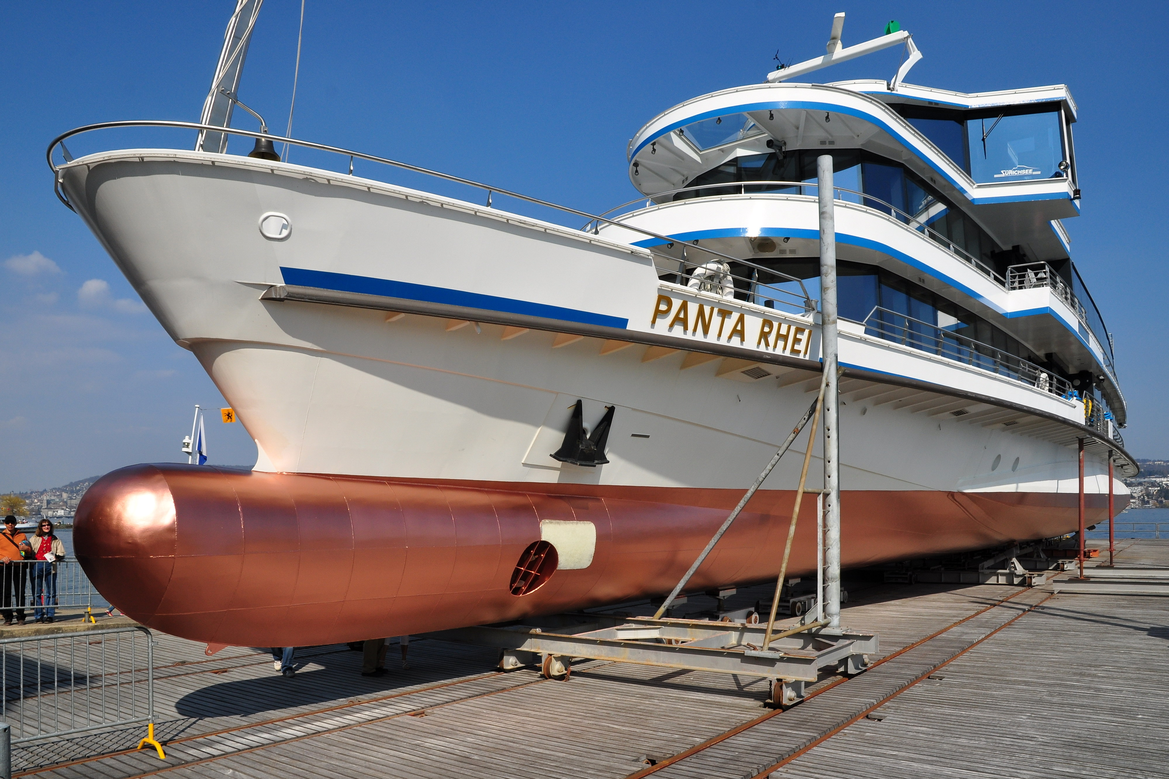 Tag der offenen Werft, Zürichsee-Schiffahrtsgesellschaft (ZSG) shipyard in Zürich-Wollishofen (Switzerland) : MS Panta Rhei